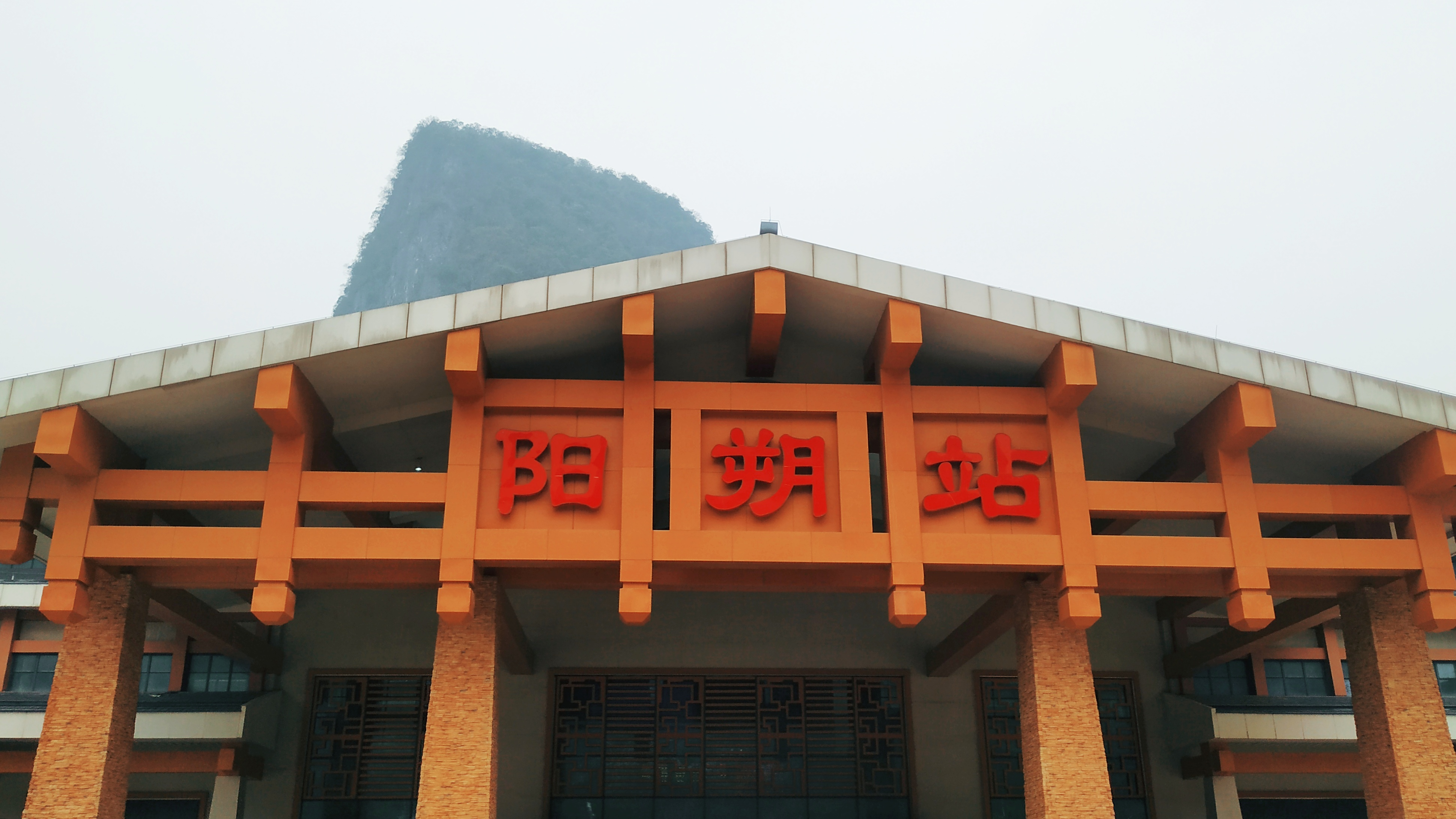 中文（中国大陆）: 桂林阳朔站